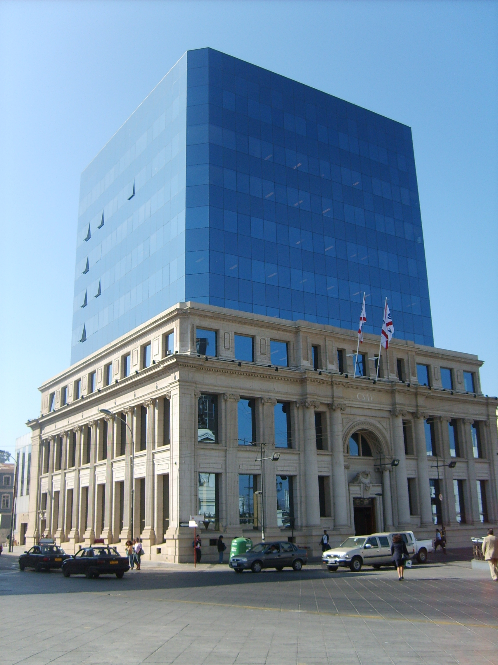 Edificio central de la Compañia Sudamericana de Vapores ubicado al costado de la Plaza Sotomayor en Valparaiso Chile